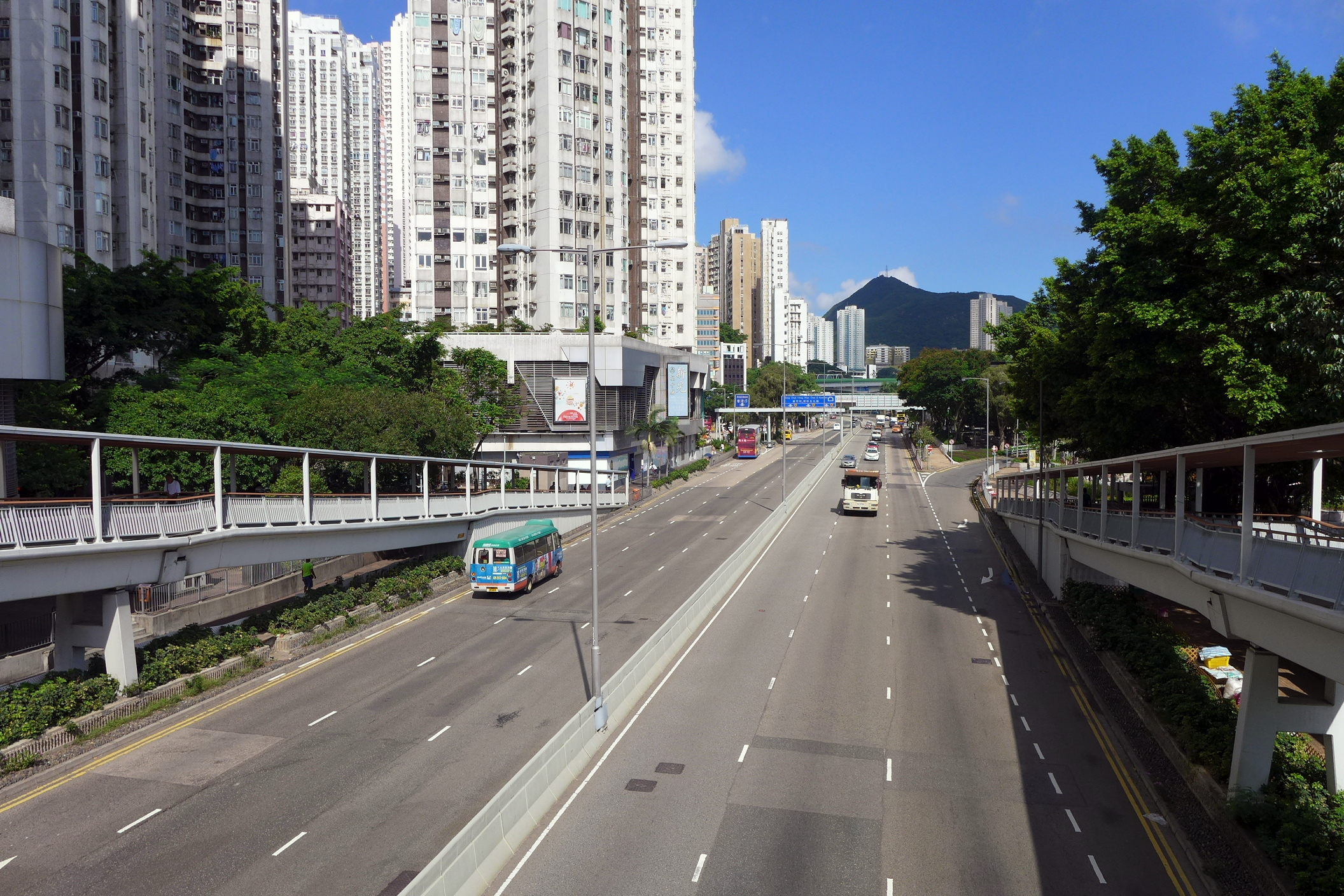 Aberdeen Praya Road